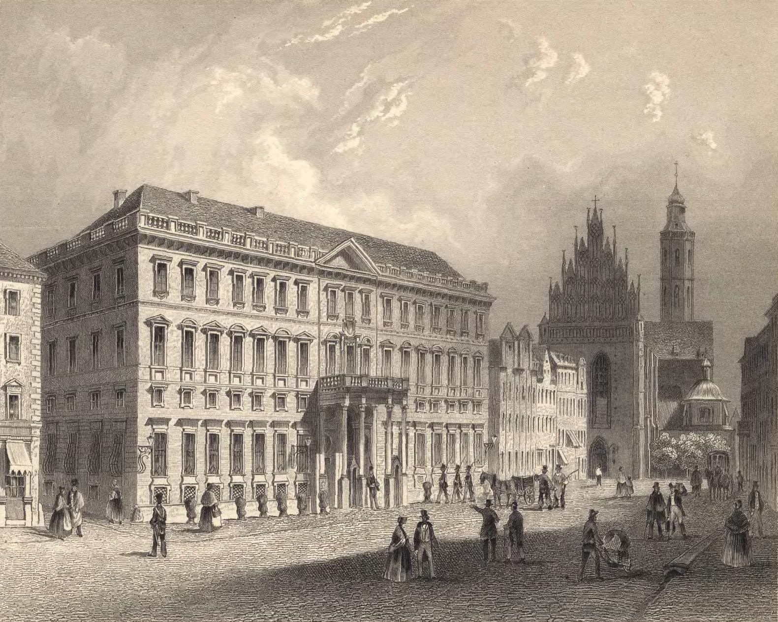 Regierungsgebäude und Dominikanerkirche in Breslau. Stahlstich 19. Jahrhundert